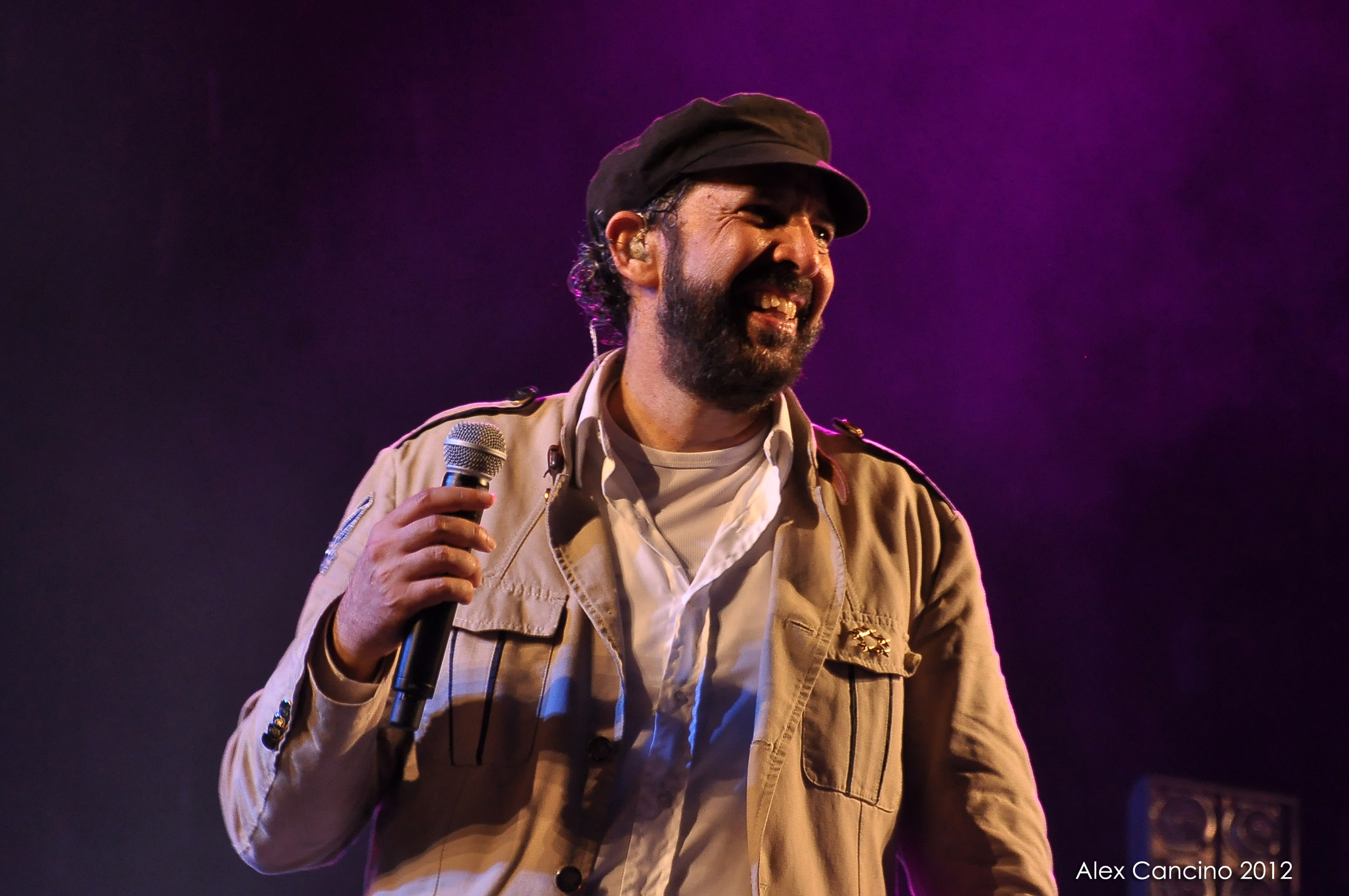 Juan Luis Guerra, Estadio Olimpico 2012